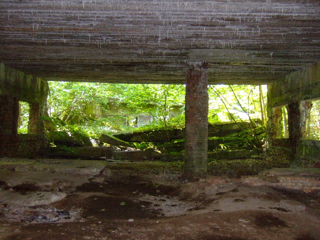 Wolfsschanze - Ruinen des Gebäudes, in dem der Stenographendienst untergebracht war